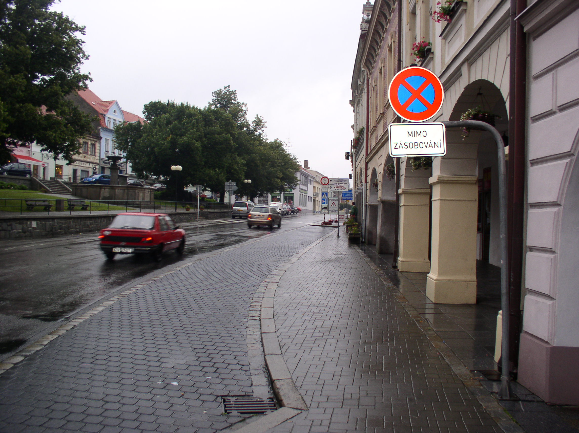 Centrum města Trhové Sviny